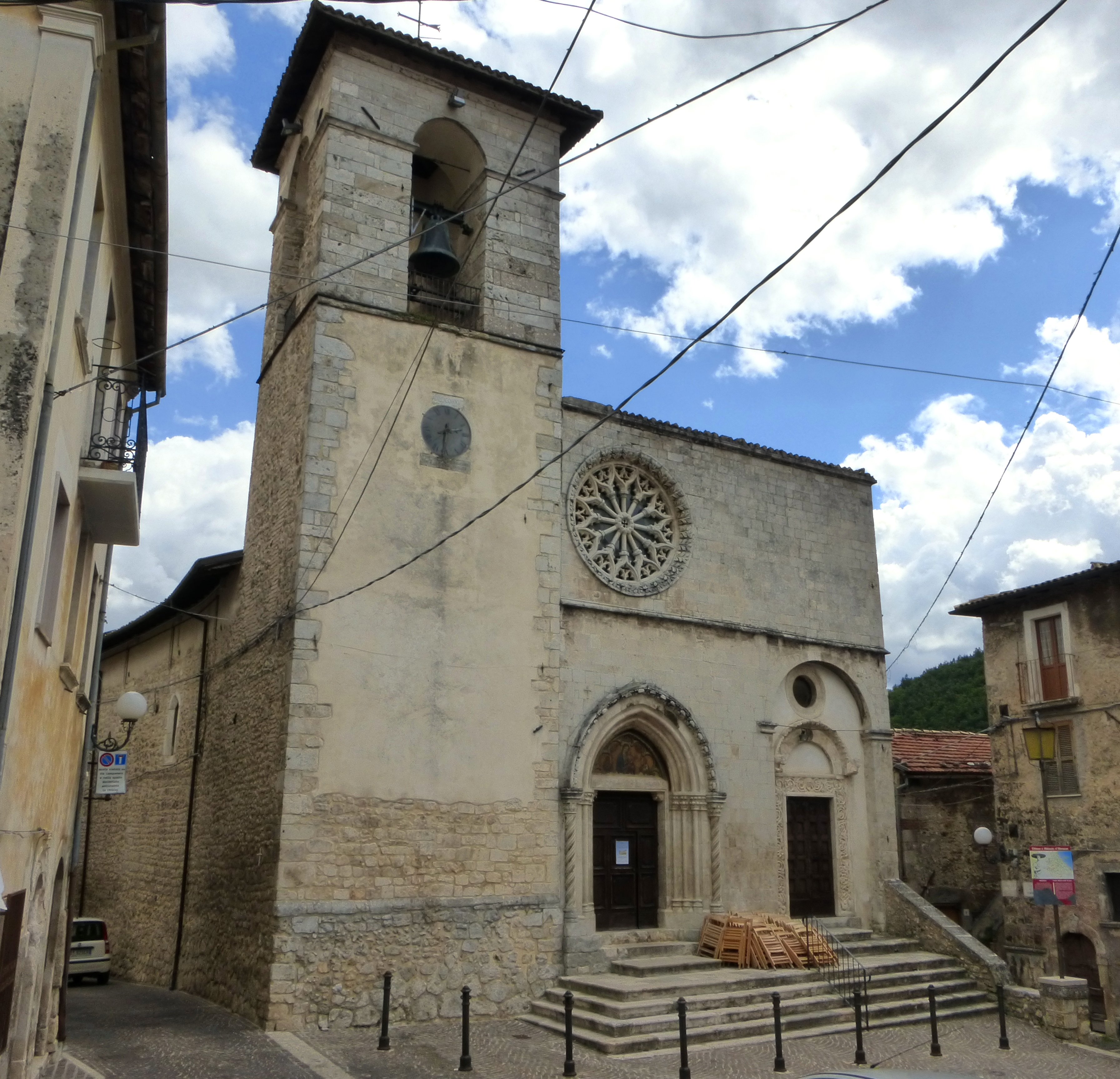 Chiesa di Santa Maria delle Grazie a Magliano de' Marsi (AQ)